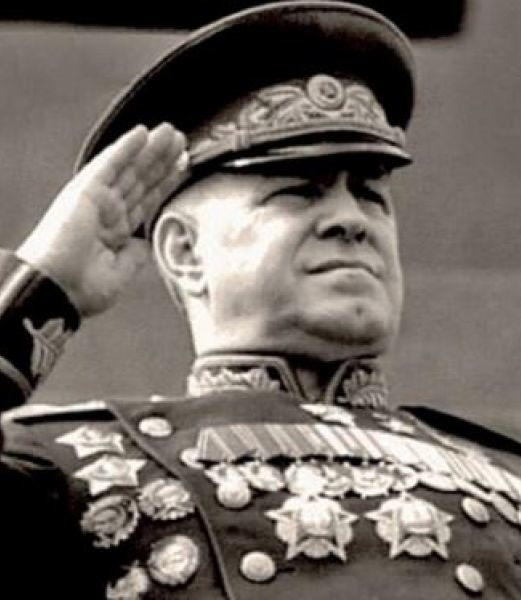 Il maresciallo Georgij Zukov